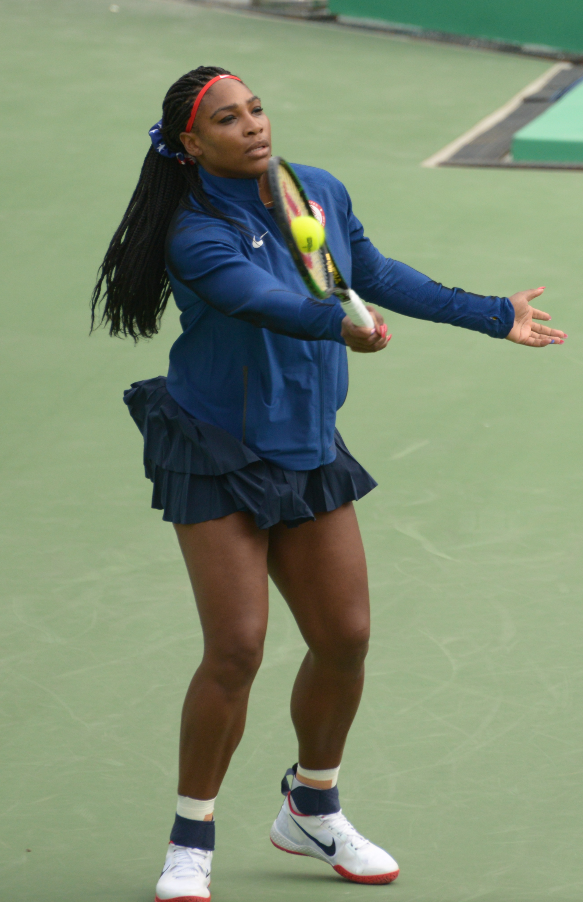 Serena Williams aquecendo para o primeiro jogo contra a australiana Daria Gavrilova